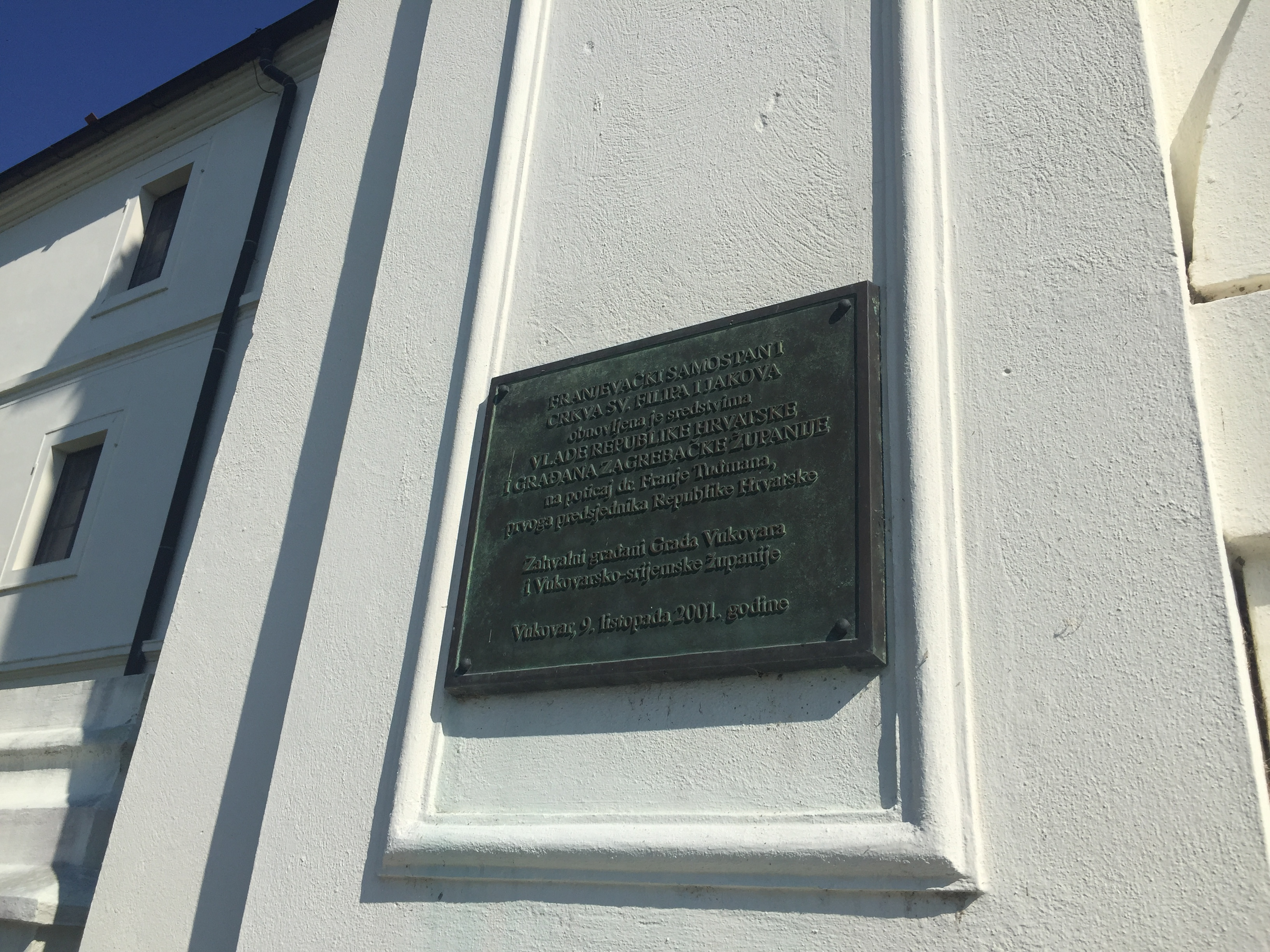 Spomen-ploča na ulazu franjevačkog samostana i crkve sv. Filipa i Jakova u Vukovaru, 2019. godine